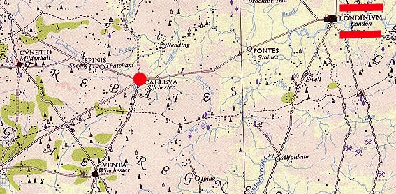 Silchester. Kartenn-OS. Rb